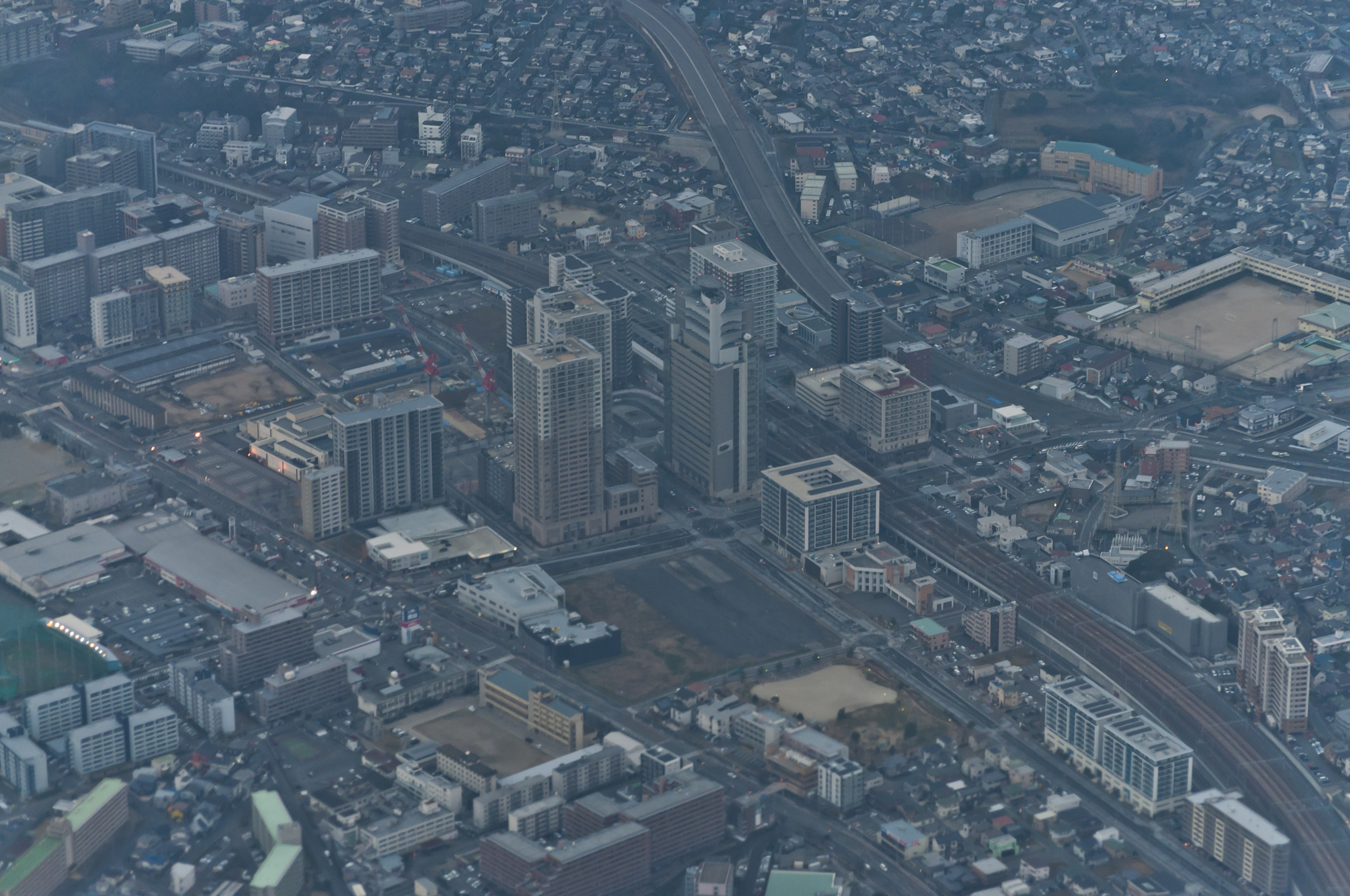 福岡市東区千早のJR/西鉄千早駅周辺の空撮画像。2015年1月31日、旅客機の機内から投稿者が撮影。